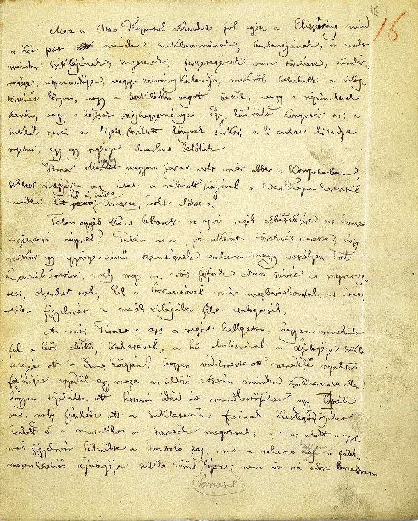 Jókai Mór Az arany ember című regényének egy fóliója, A Szent Borbála és utasai című fejezetből. Petőfi Literary Museum LocationBudapestCoordinates47° 29′ 29″ N, 19° 03′ 29″ E Established1957Website control VIAF: 152132060 SUDOC: 02903941X BNF: 12074898m